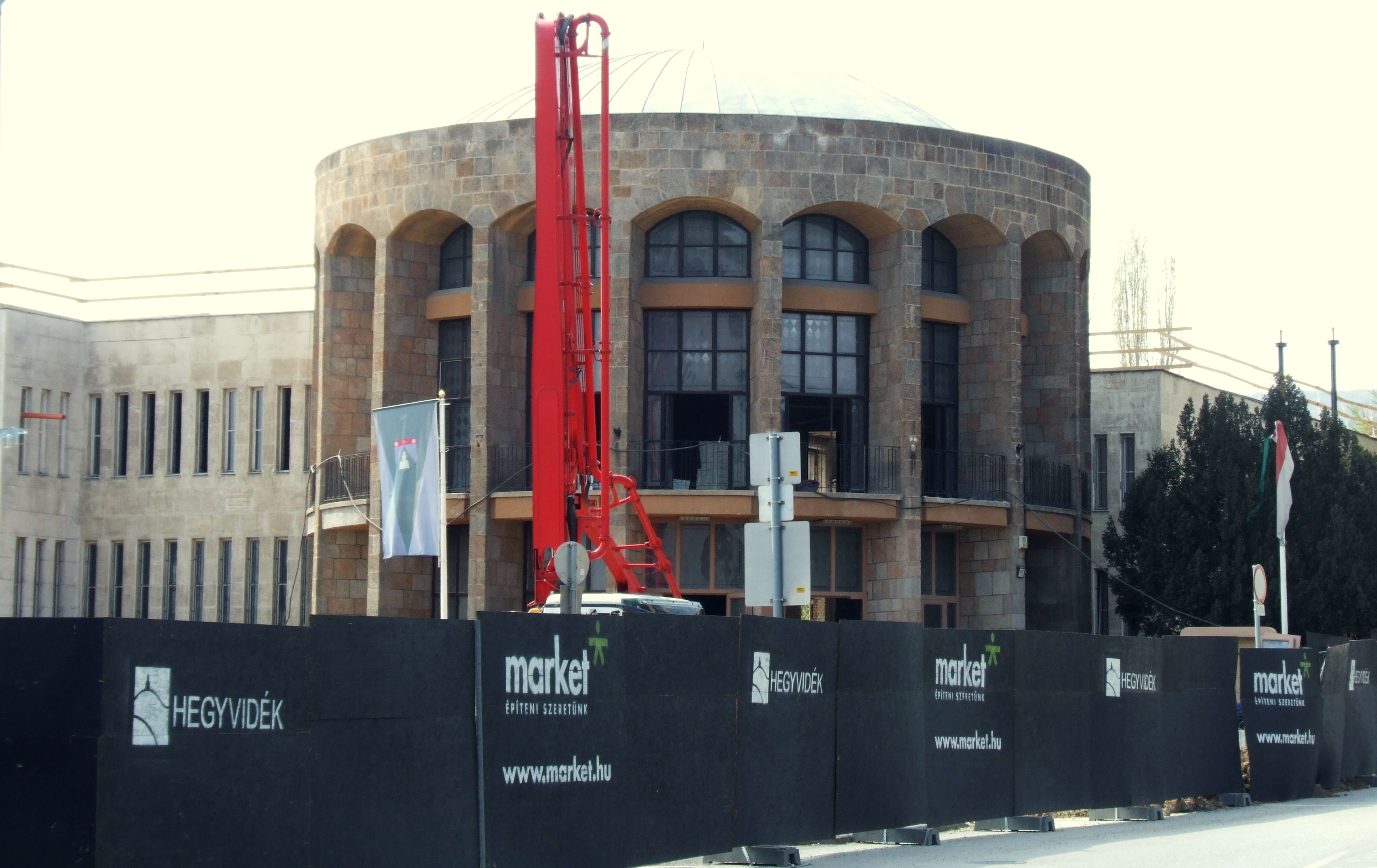 MOM Kulturális Központ rekonstrukció